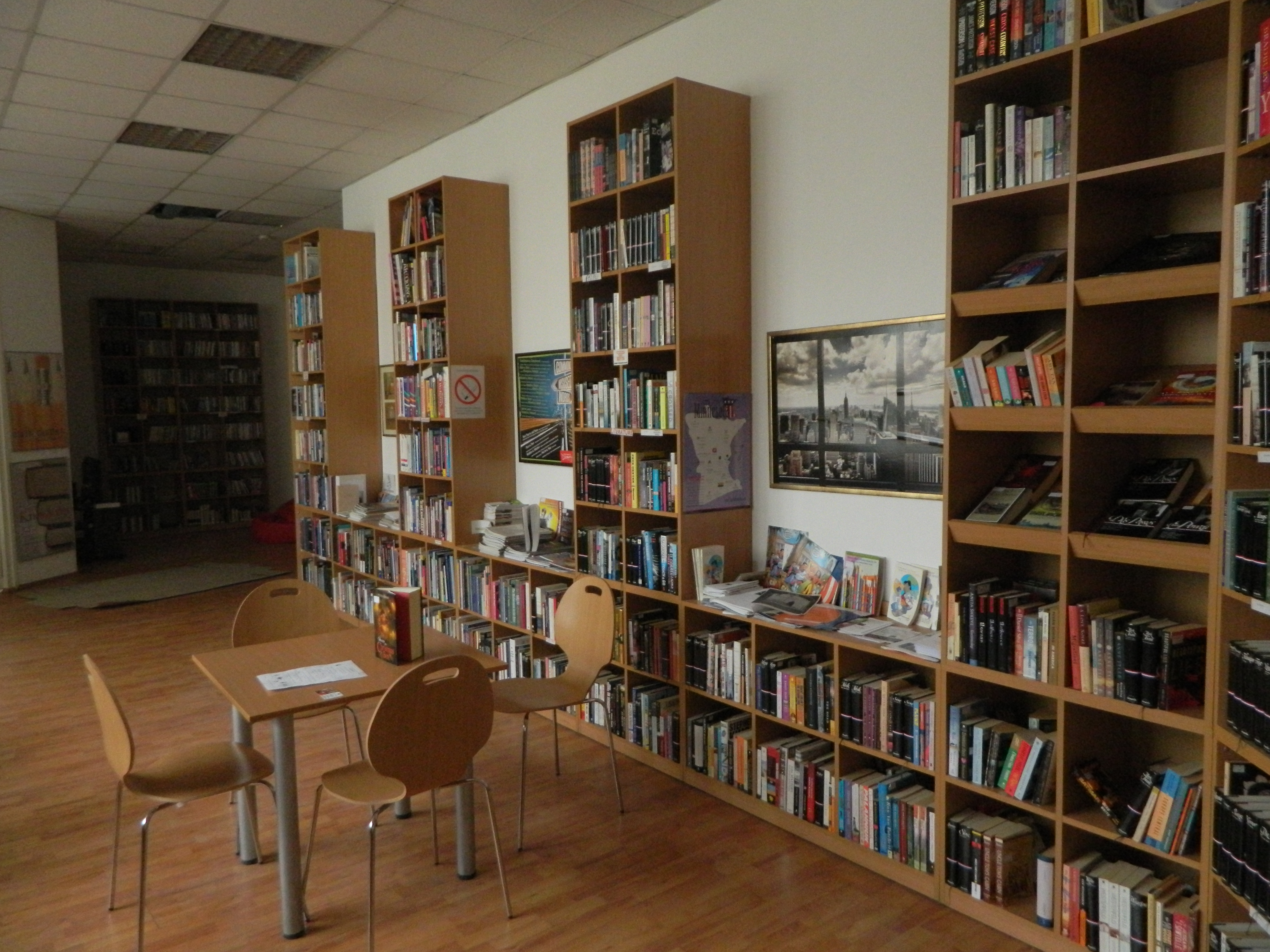 Јавна библиотека “Бора Станковић” Врање